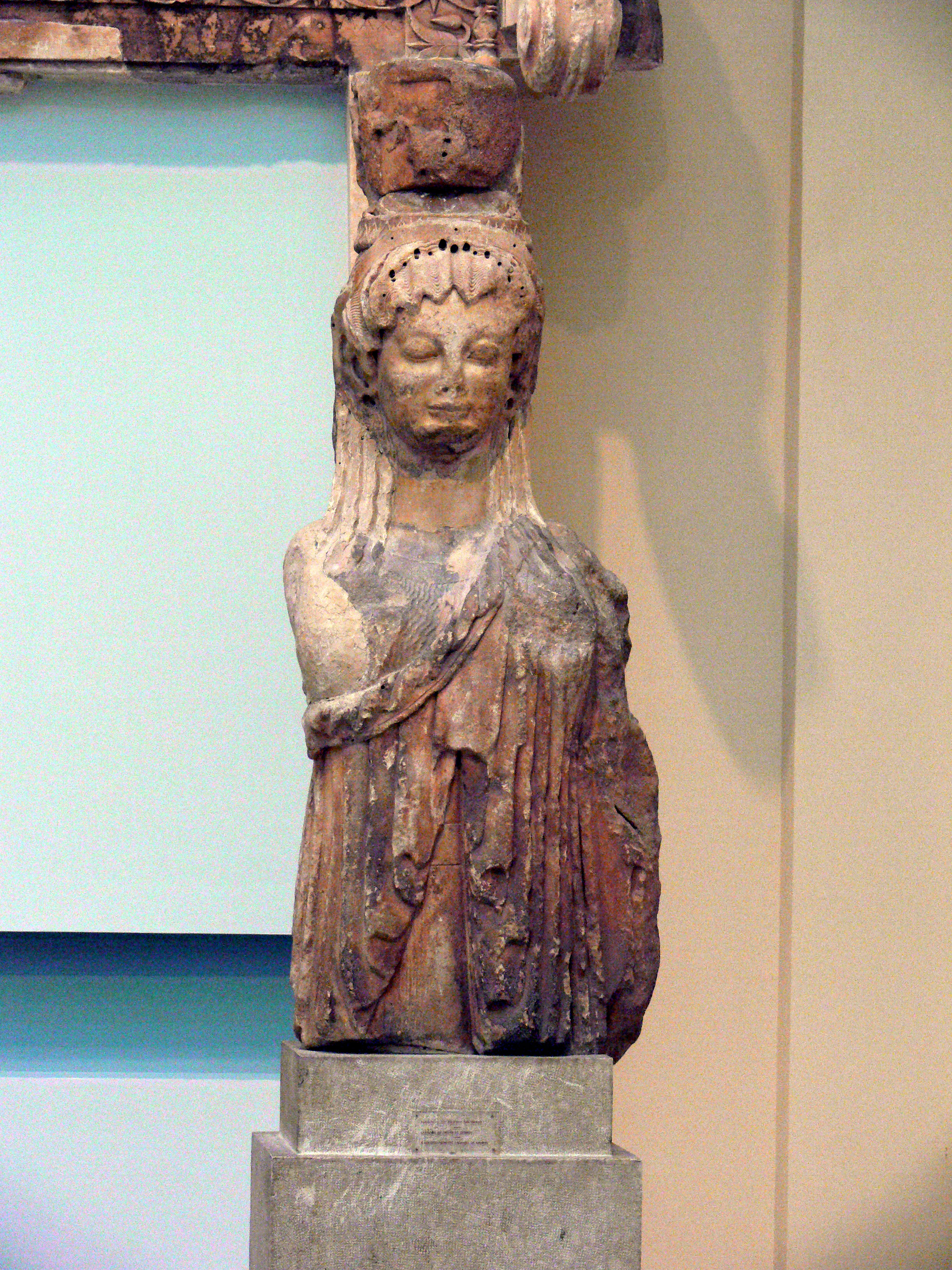 Kore in Delphi